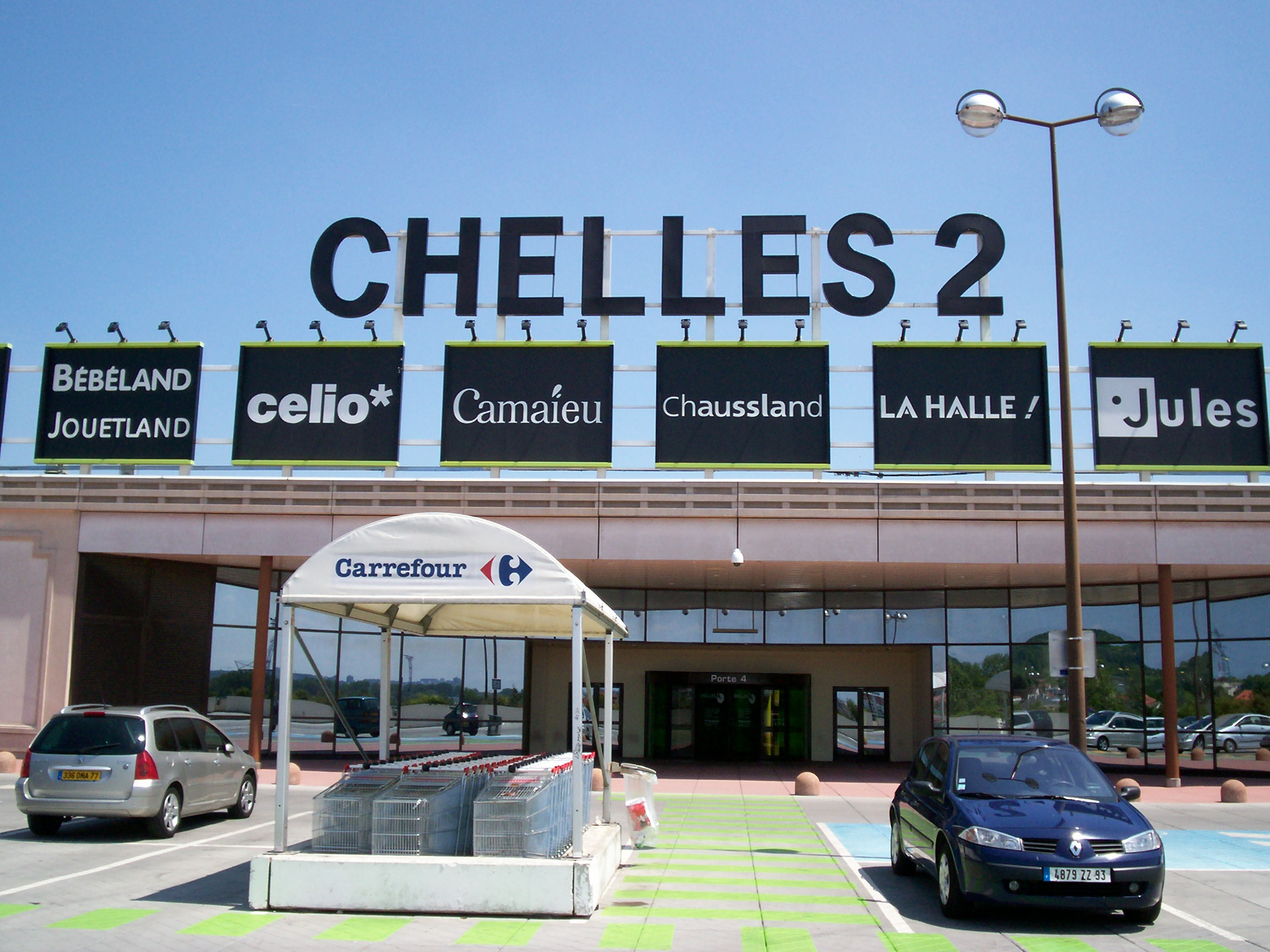 Porte 4 de Chelles2